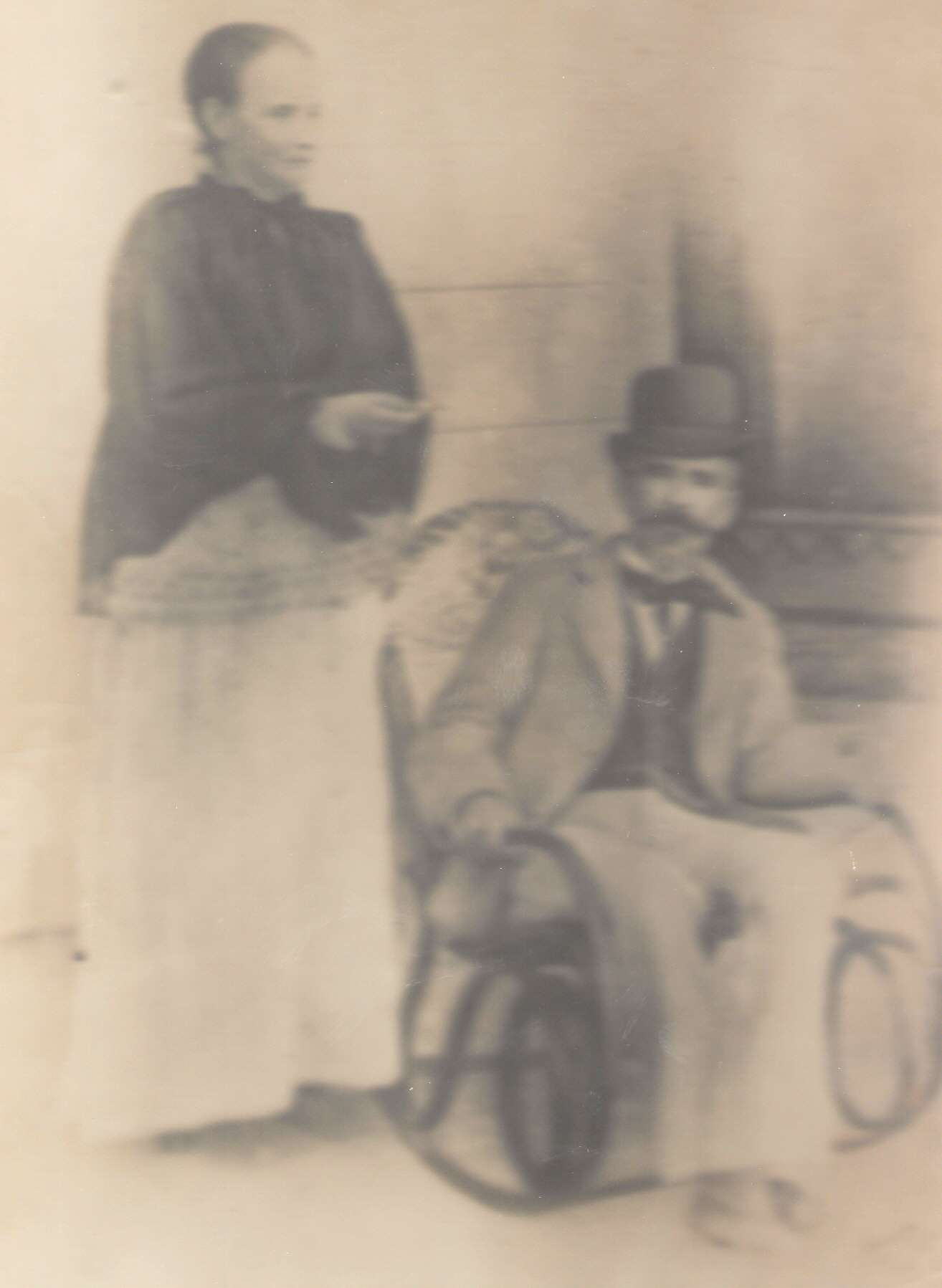 Fotografía de dos pedagogos cubano-mexicanos (yucatecos): Antonio Menendez de la Peña y Angela Gonzalez Benitez. En Izamal, Yucatan, Mexico.